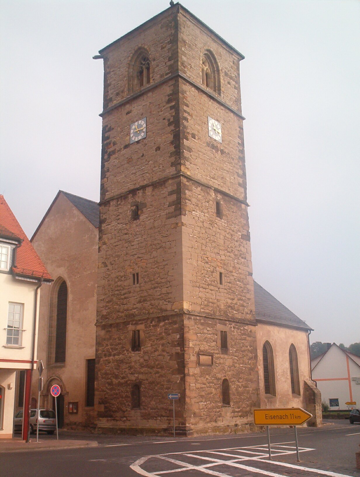 Kirche in Creuzburg